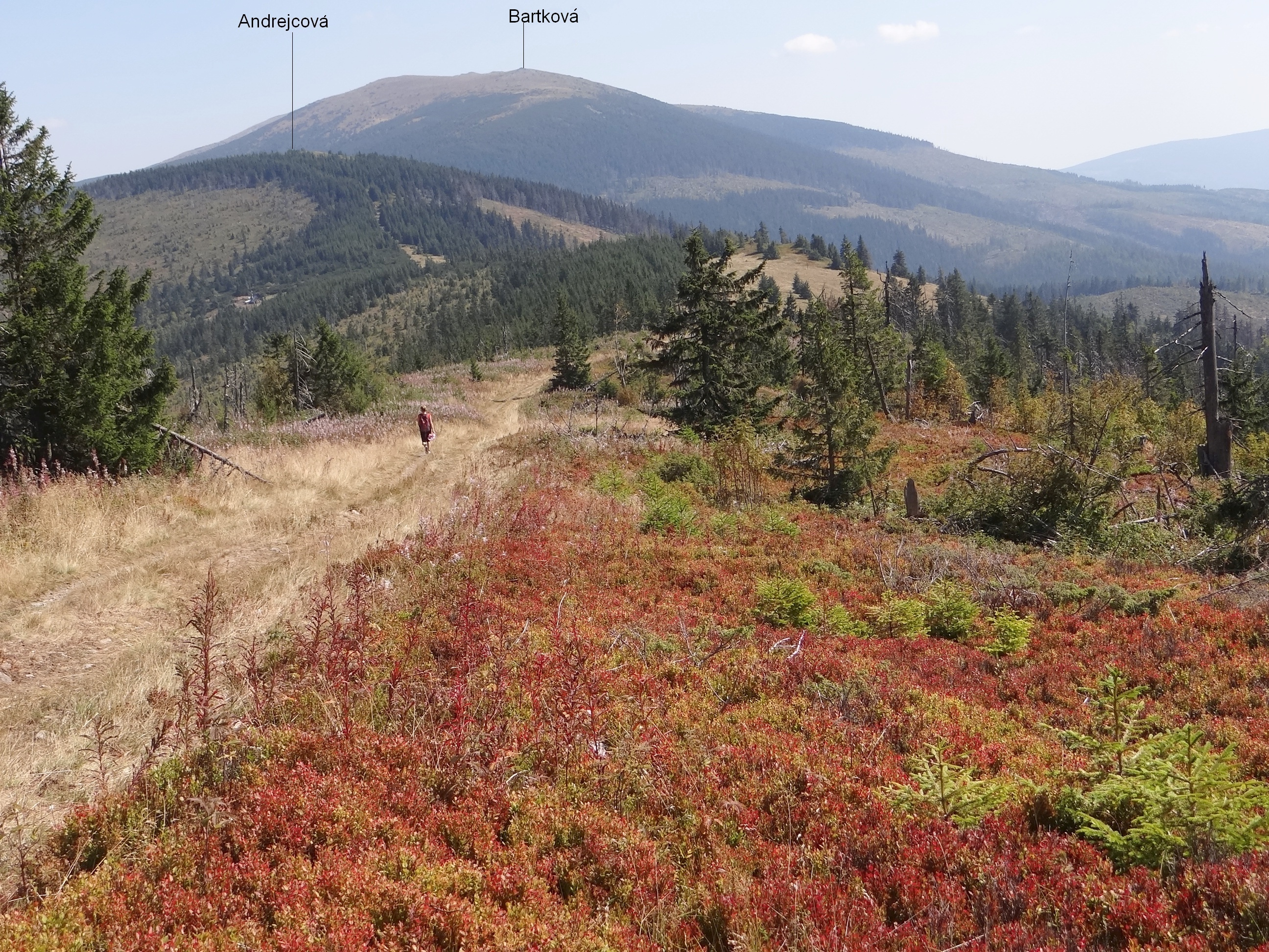 Widok od zachodniej strony na grań ze szczytem Andrejcová i Bartková